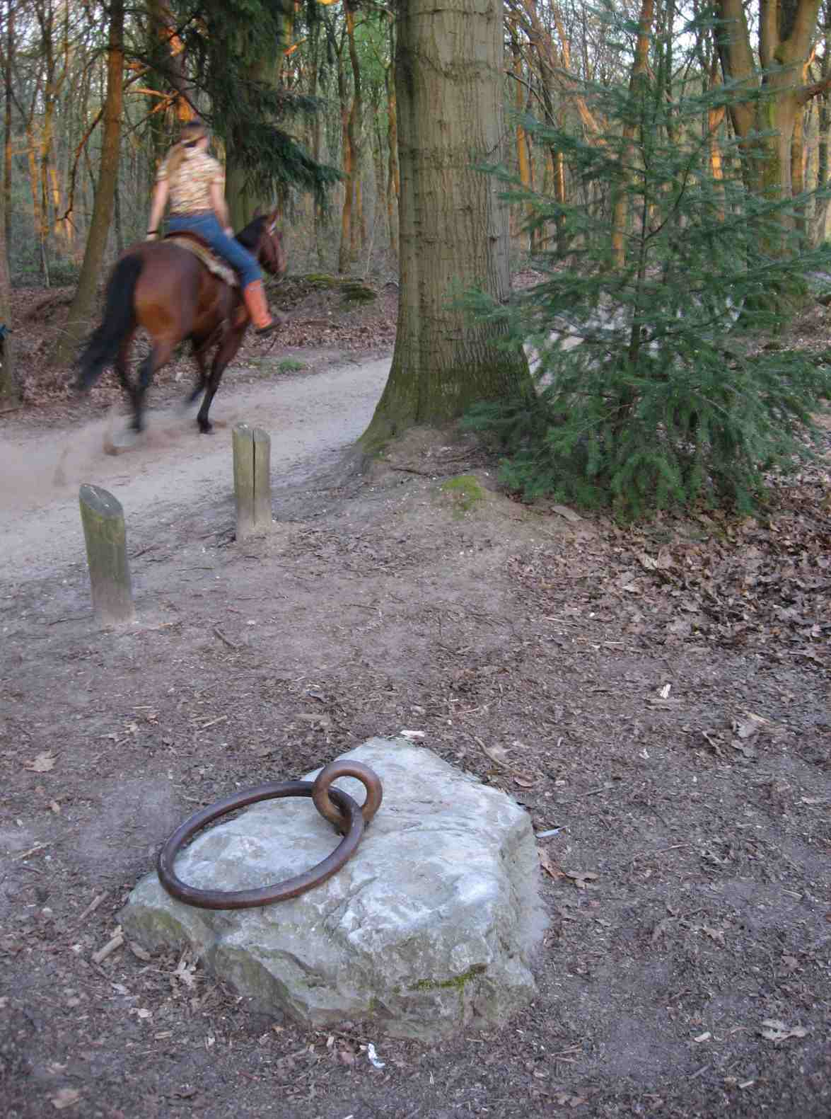 Zwaartepunt van Nederland, bij Putten 52° 14.604' N - 5° 38.063' E